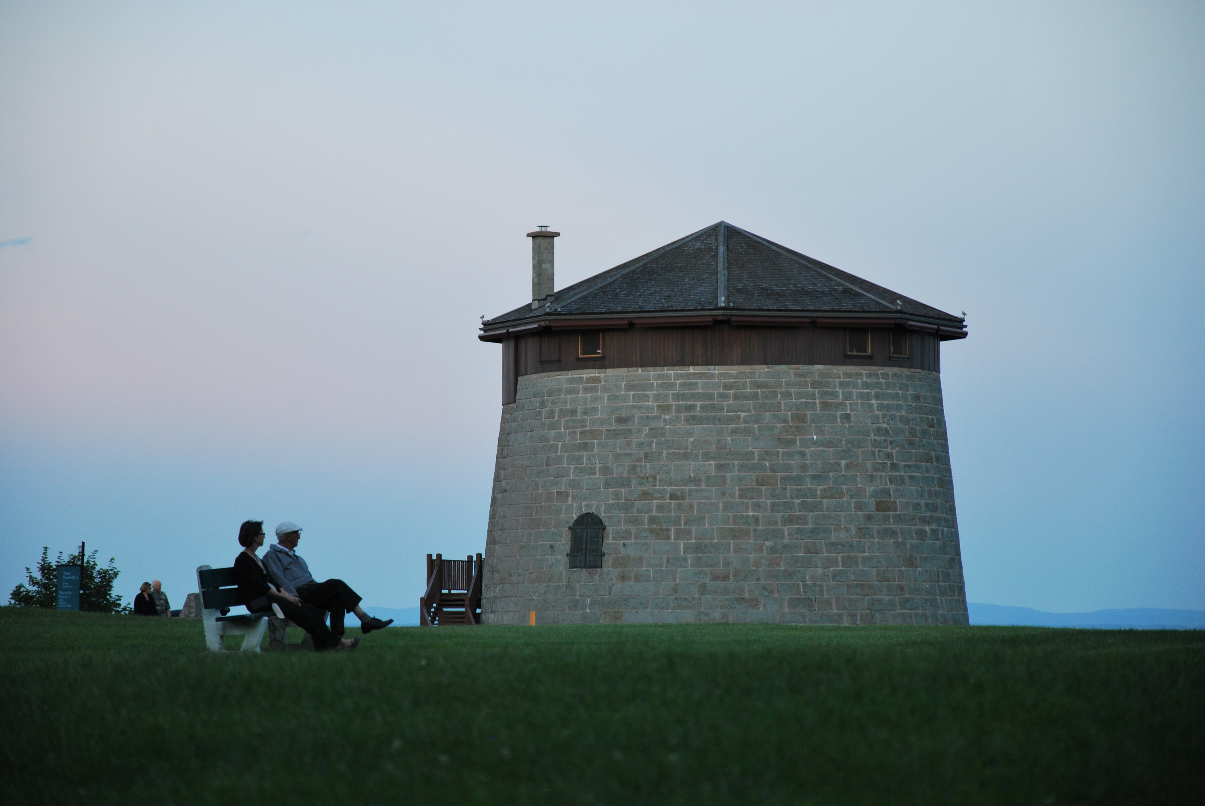 Un père et sa fille se reposant Tour Martello 1 - Plaines d'Abraham, Québec (Qc)